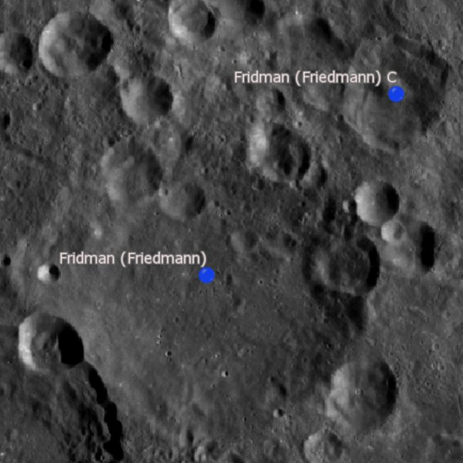 Cráter lunar Fridman. Cráter satélite. (Imagen LRO)